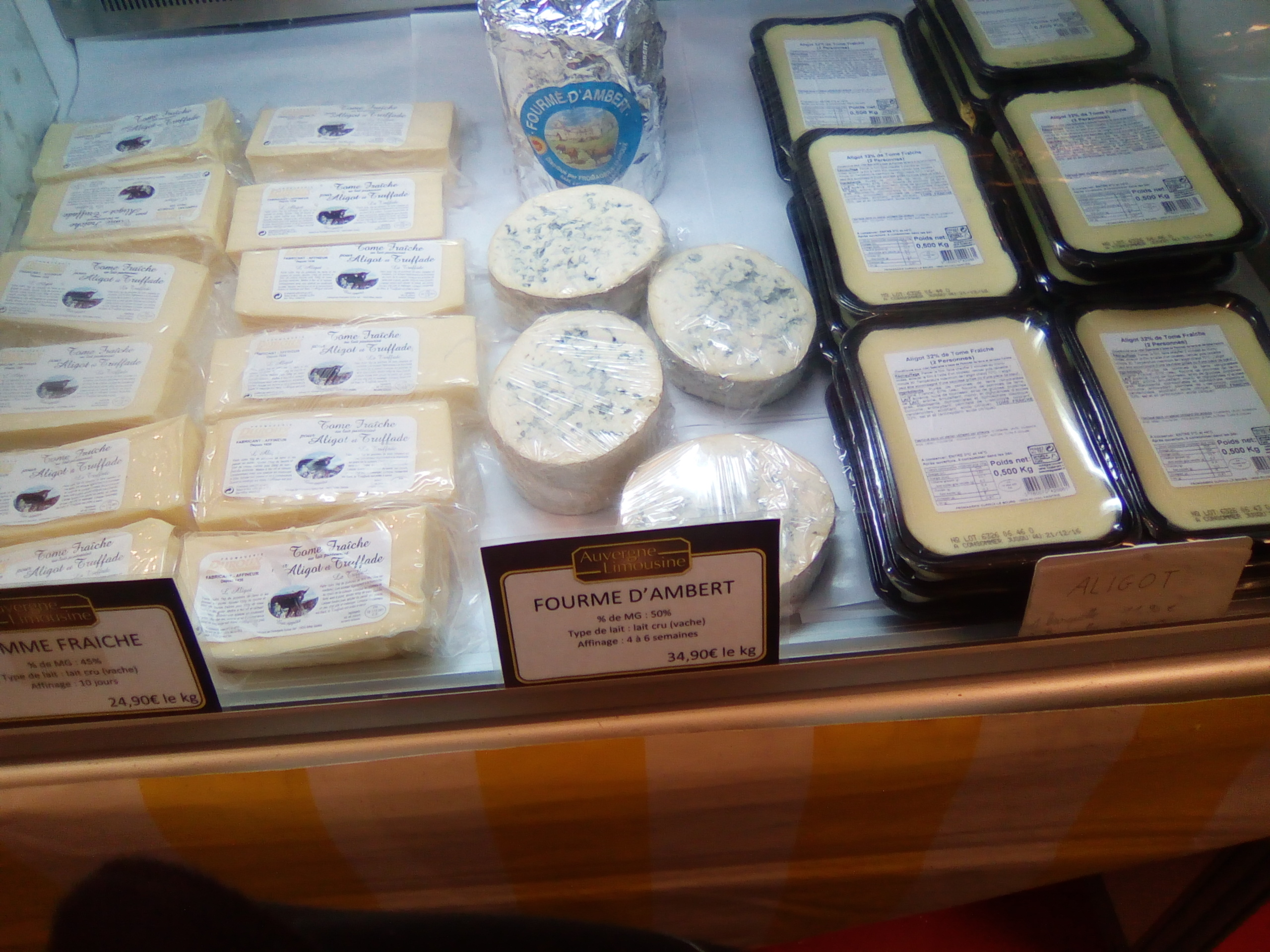 Salon Saveurs des Plaisirs gourmands.